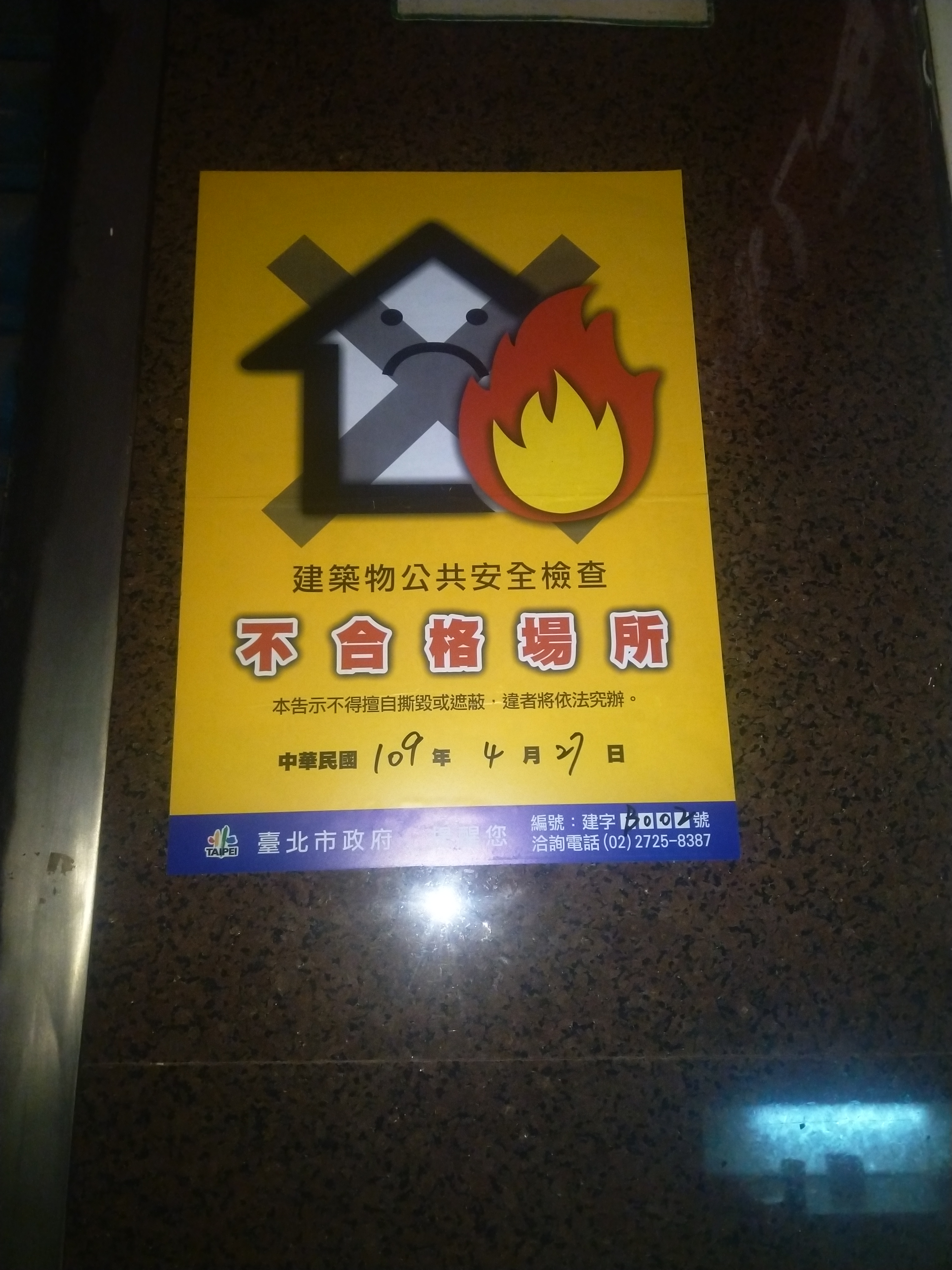 中文（台灣）: 錢櫃南京店 臺北市政府建築物安全檢查不合格場所標章